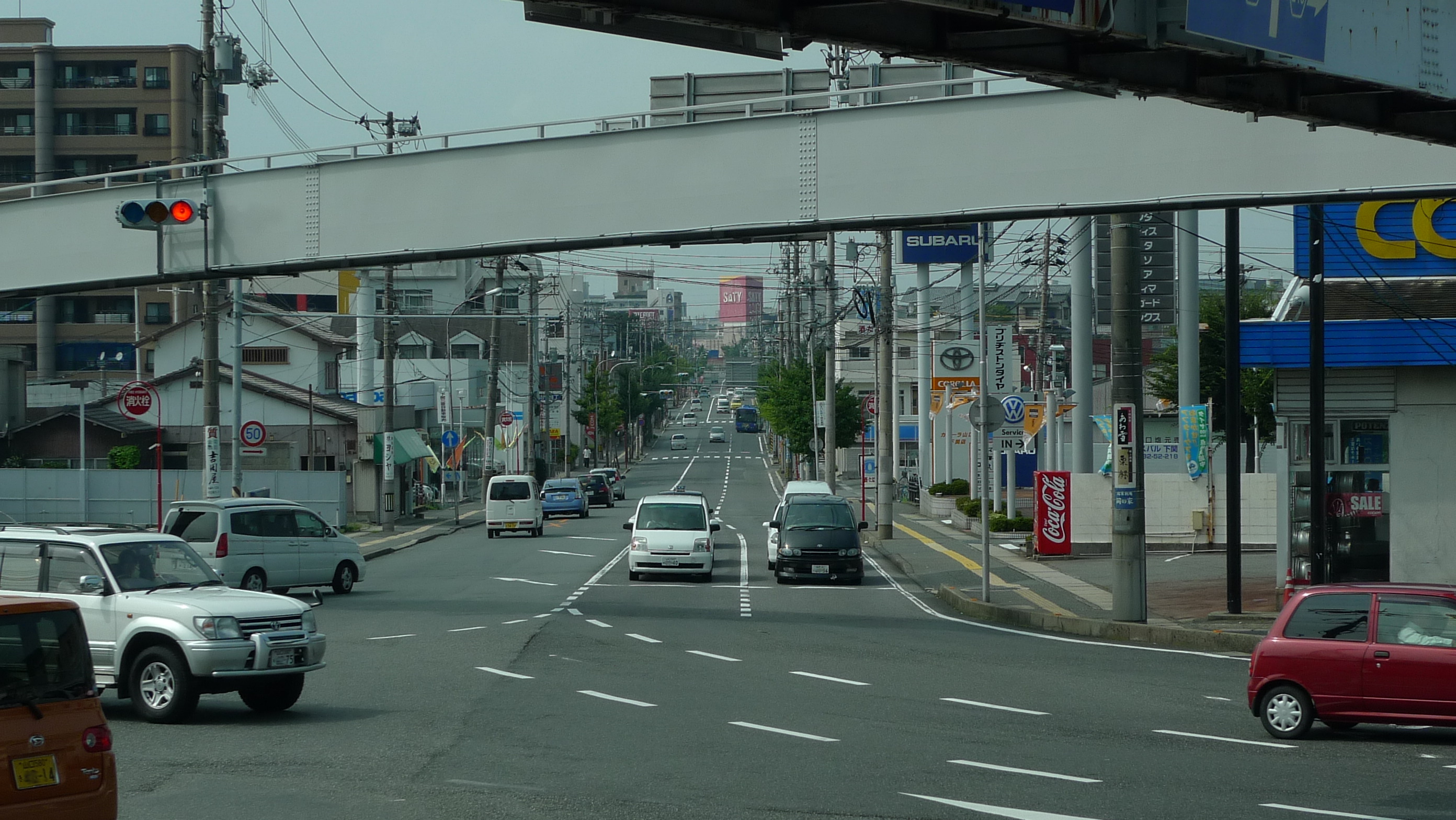 旭交差点から北へのびる山口県道248号線。正面奥の赤い看板は山の田サティ。(2009年8月撮影)